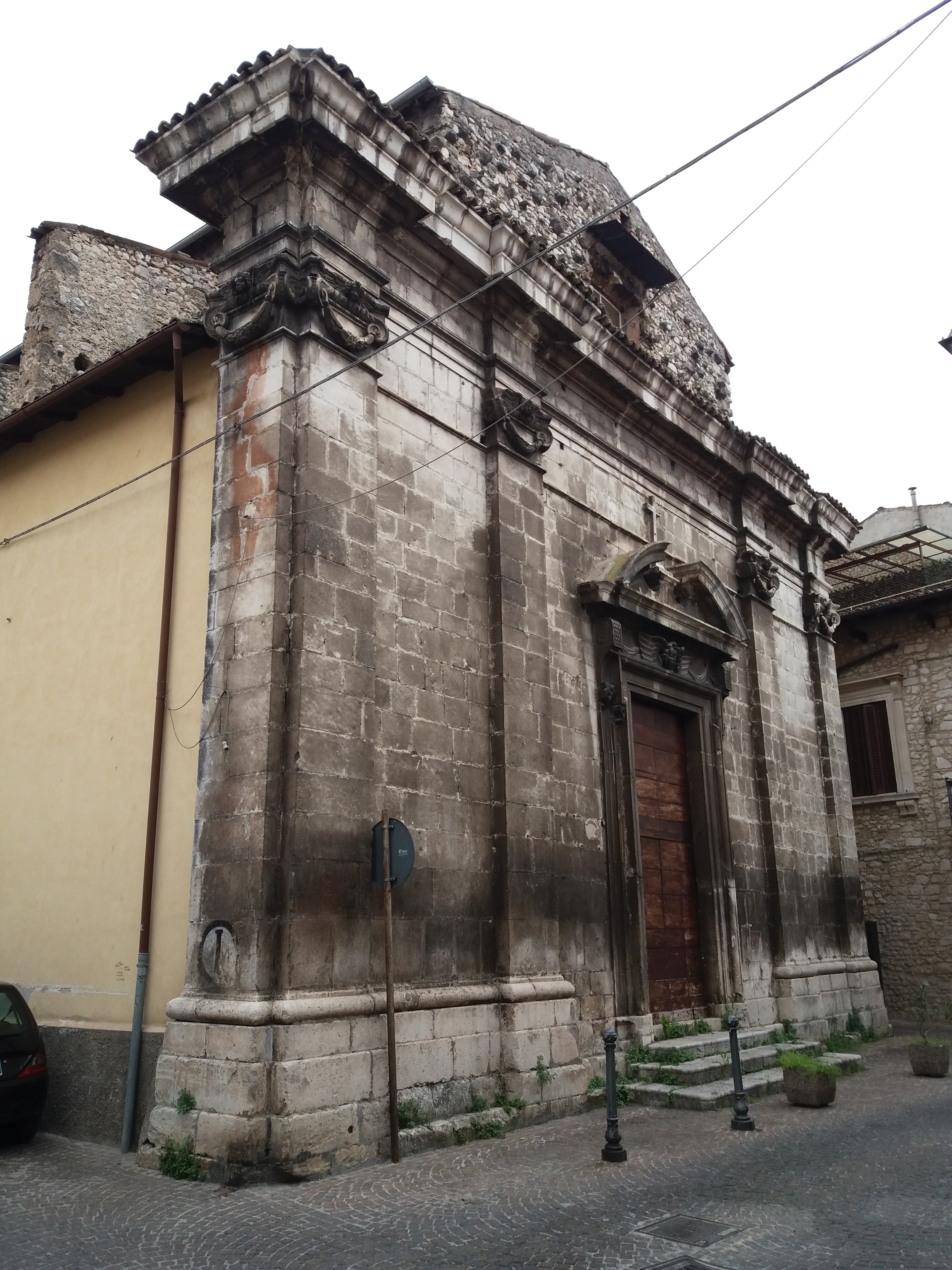 Sulmona: Chiesa di San Pietro